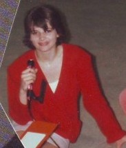 Juliette Binoche, actrice française.